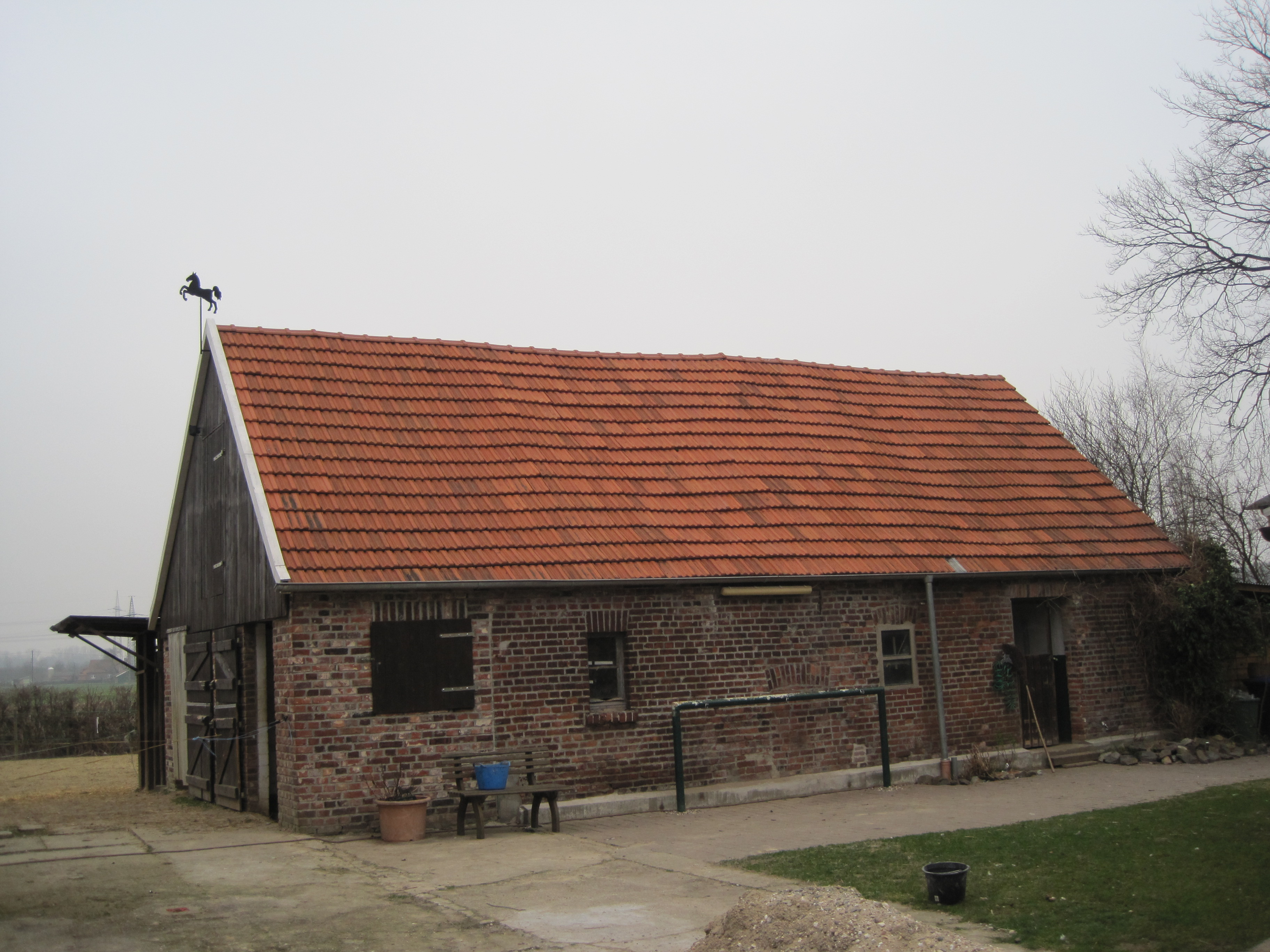 Das Foto zeigt ein Gebäude des Klosterhofes Bockum-Hövel, Hamm-Westfalen.